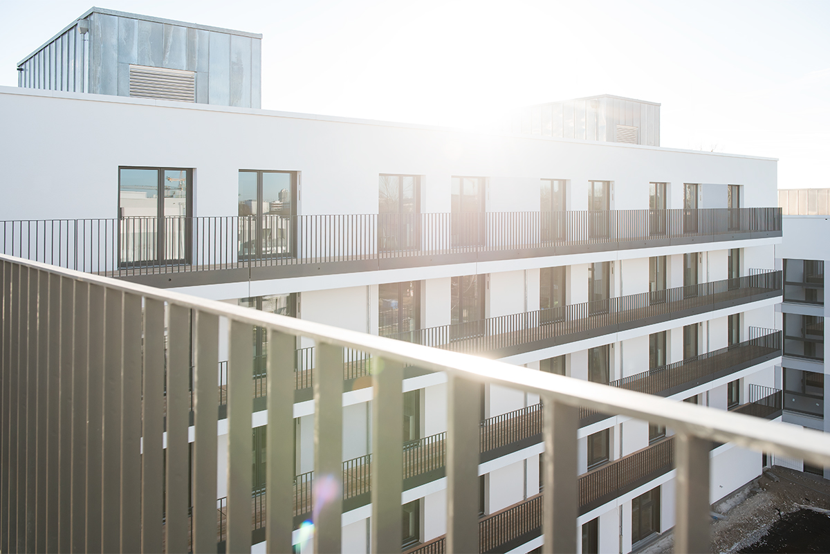 Studentenwohnungen im DomagkPark in Freimann